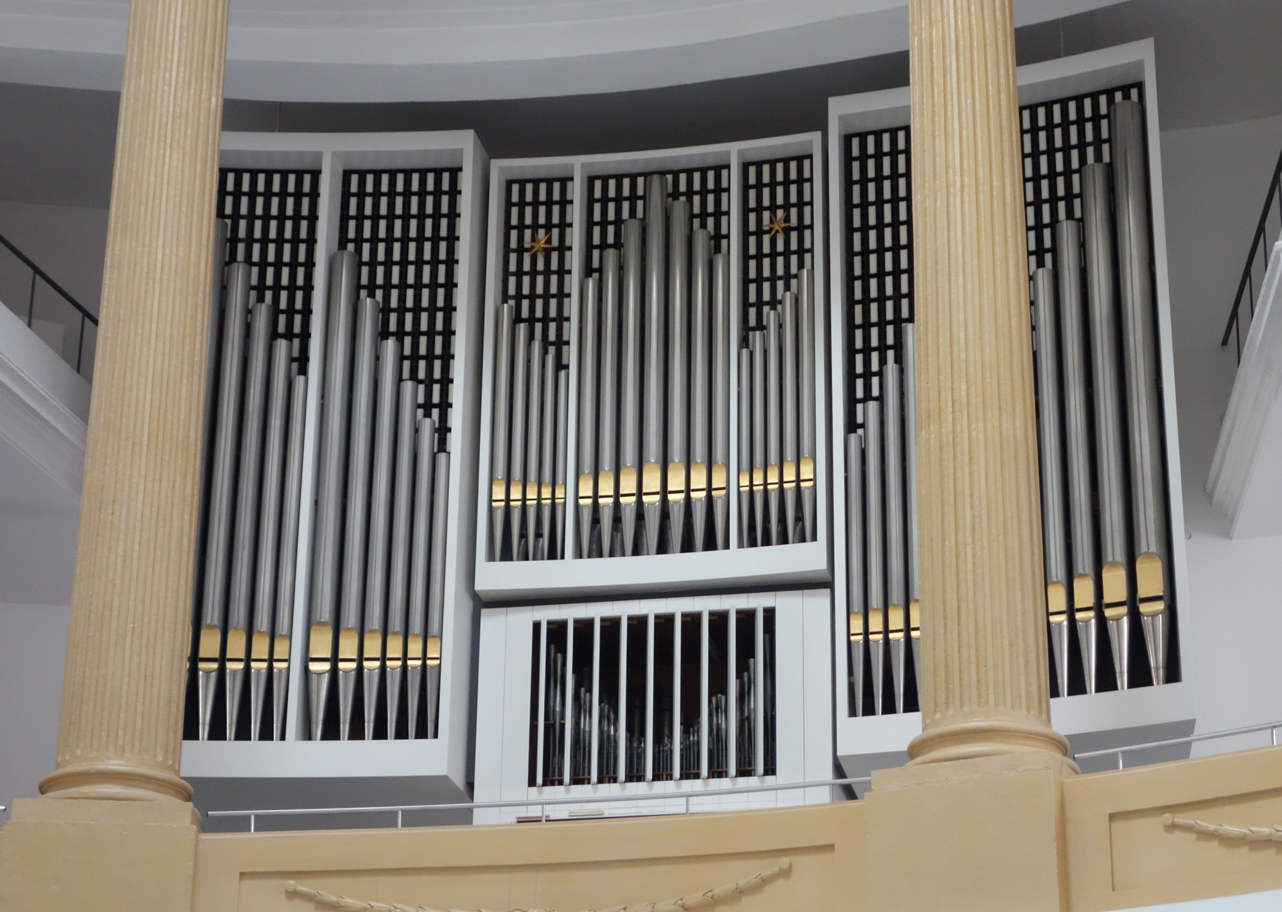 Orgel der Lambertikirche Oldenburg, Niedersachsen, Deutschland